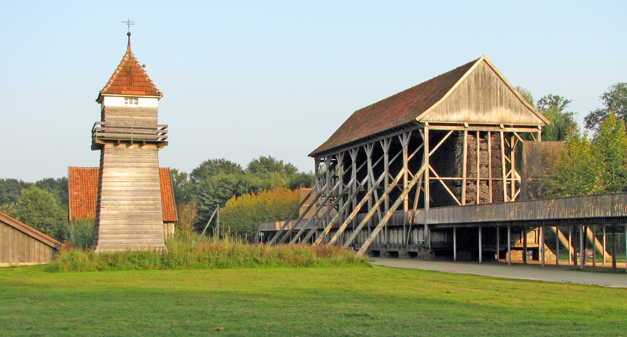 Ehemalige Saline Gottesgabe, Rheine; Soletum und Gradierwerk